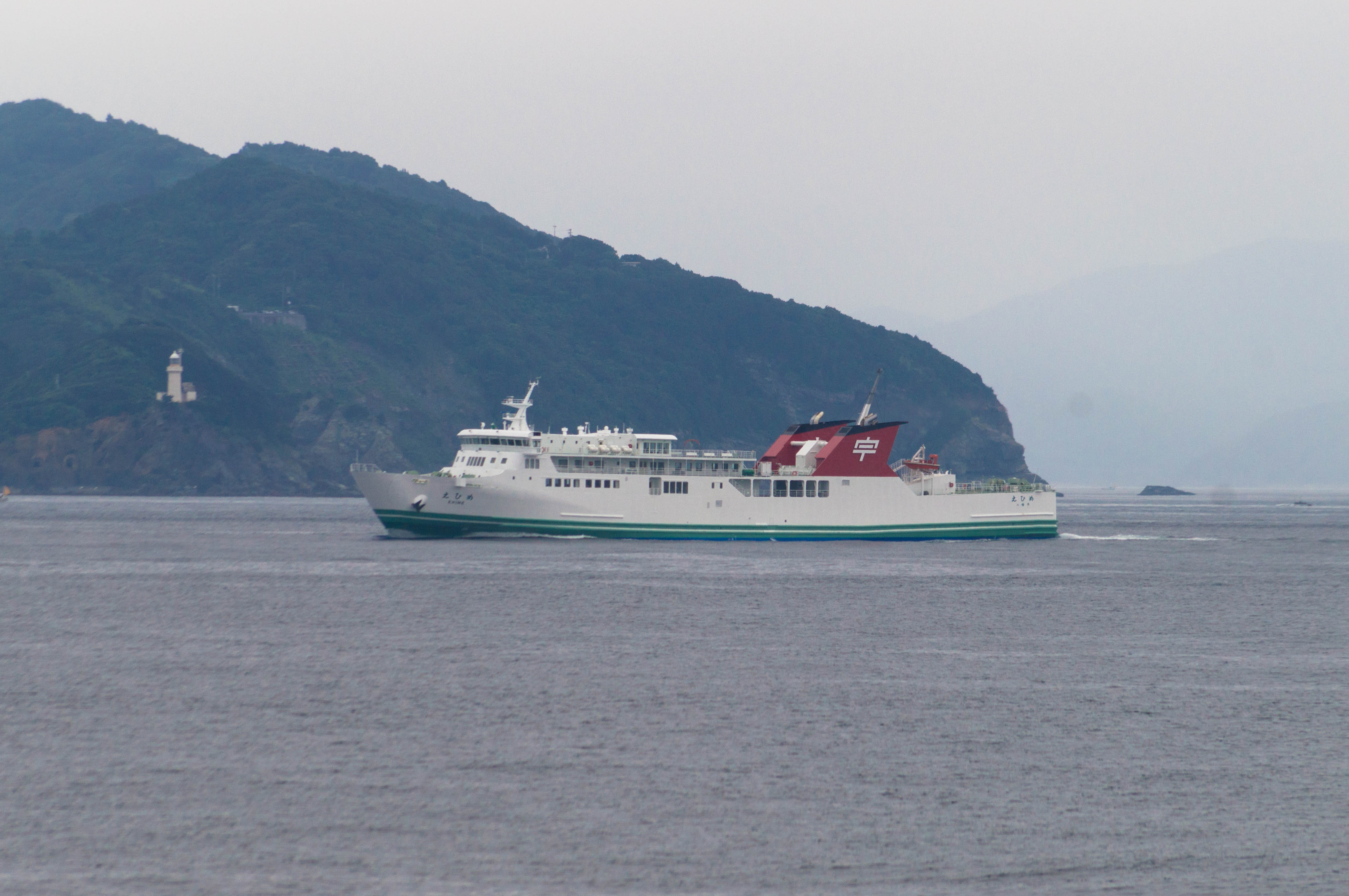 宇和島運輸「えひめ」（2016年7月17日、佐田岬沖）